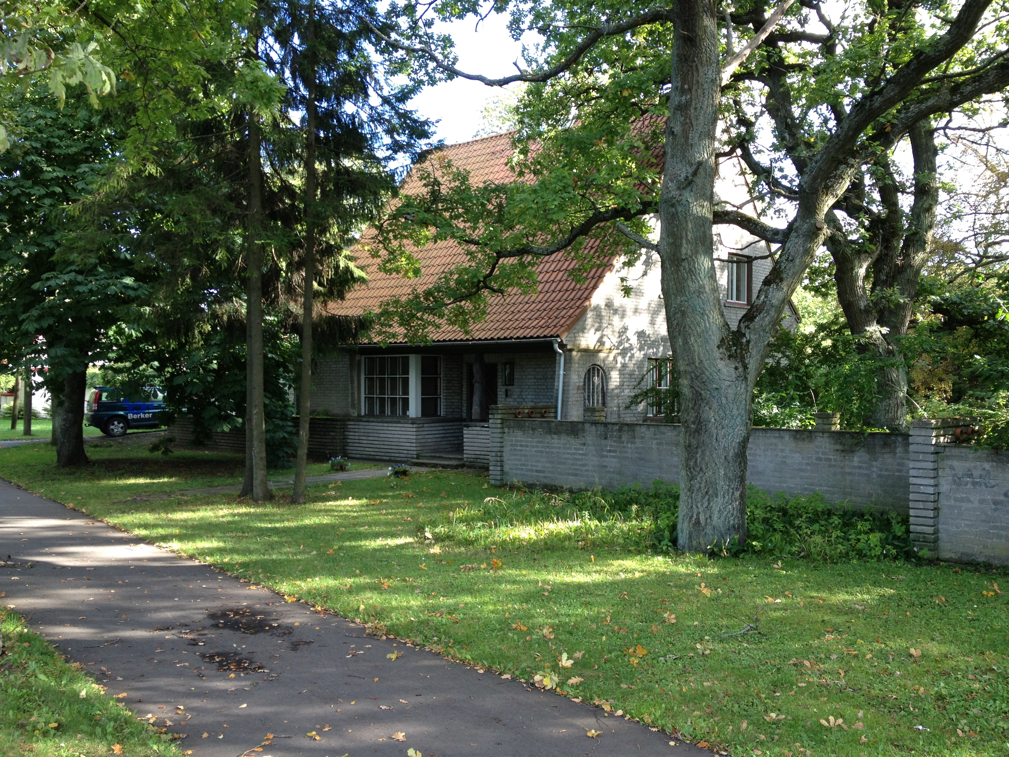 Eramu Kose tee 10, 1948.a .